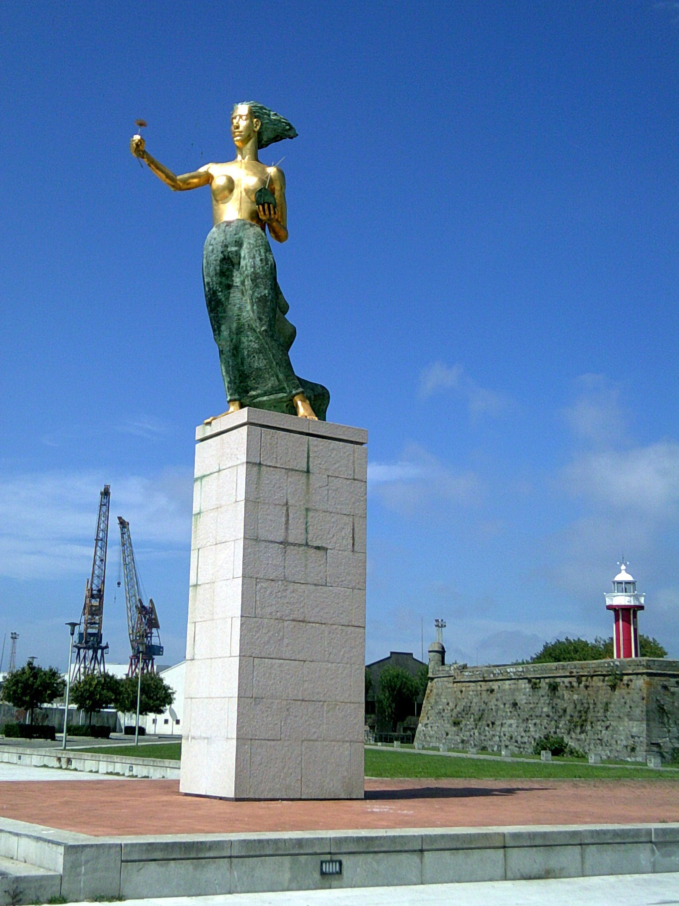 Homenagem à mulher vianesa, freguesia de Monserrate, concelho e distrito de Viana do Castelo, Portugal, de autoria do escultor vianense Manuel Gonçalves Rocha. Ao fundo, as instalações portuárias e o farol da Senhora da Agonia.